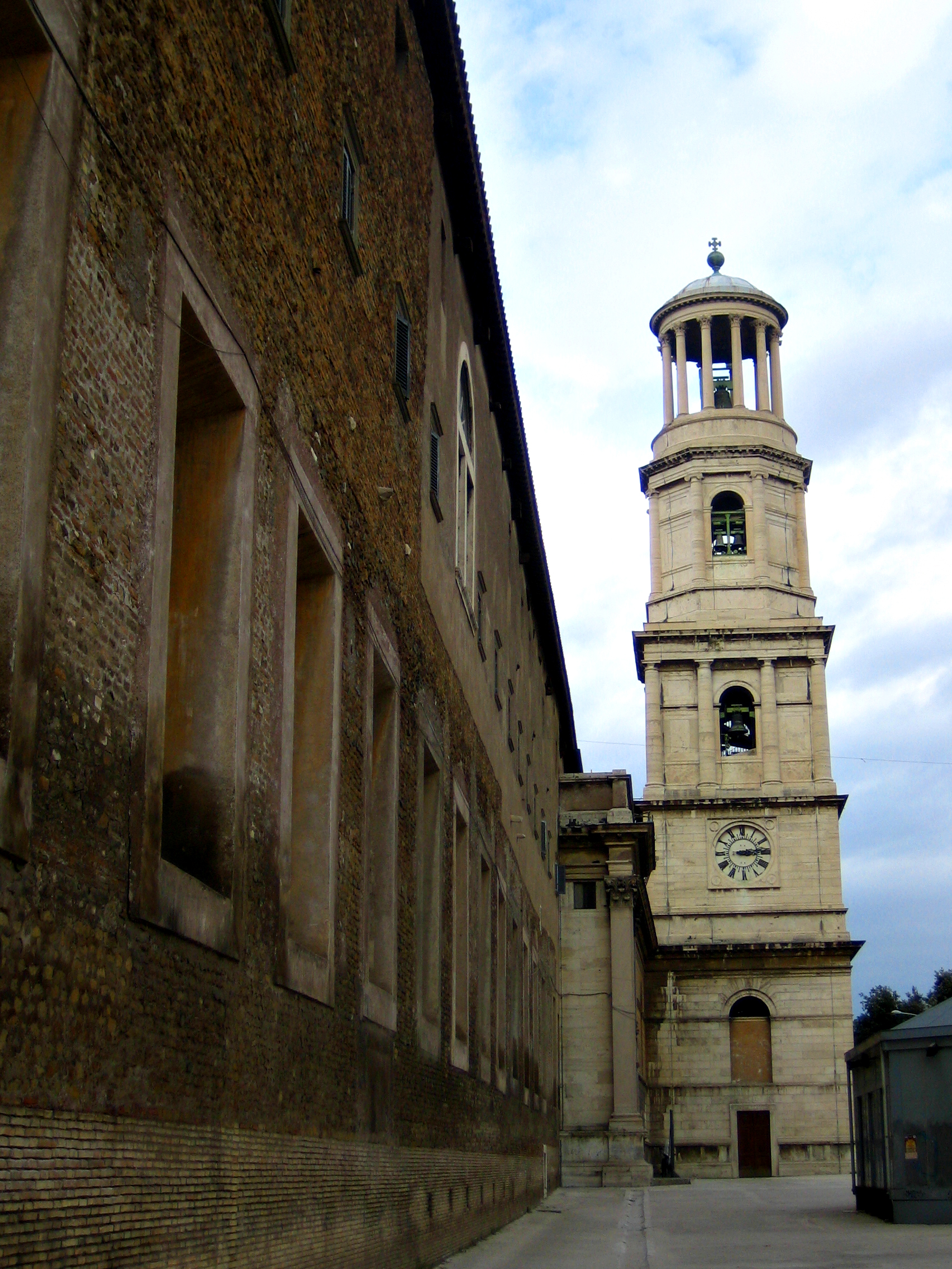 San Paolo Fuori le Mura, Roma, Italia